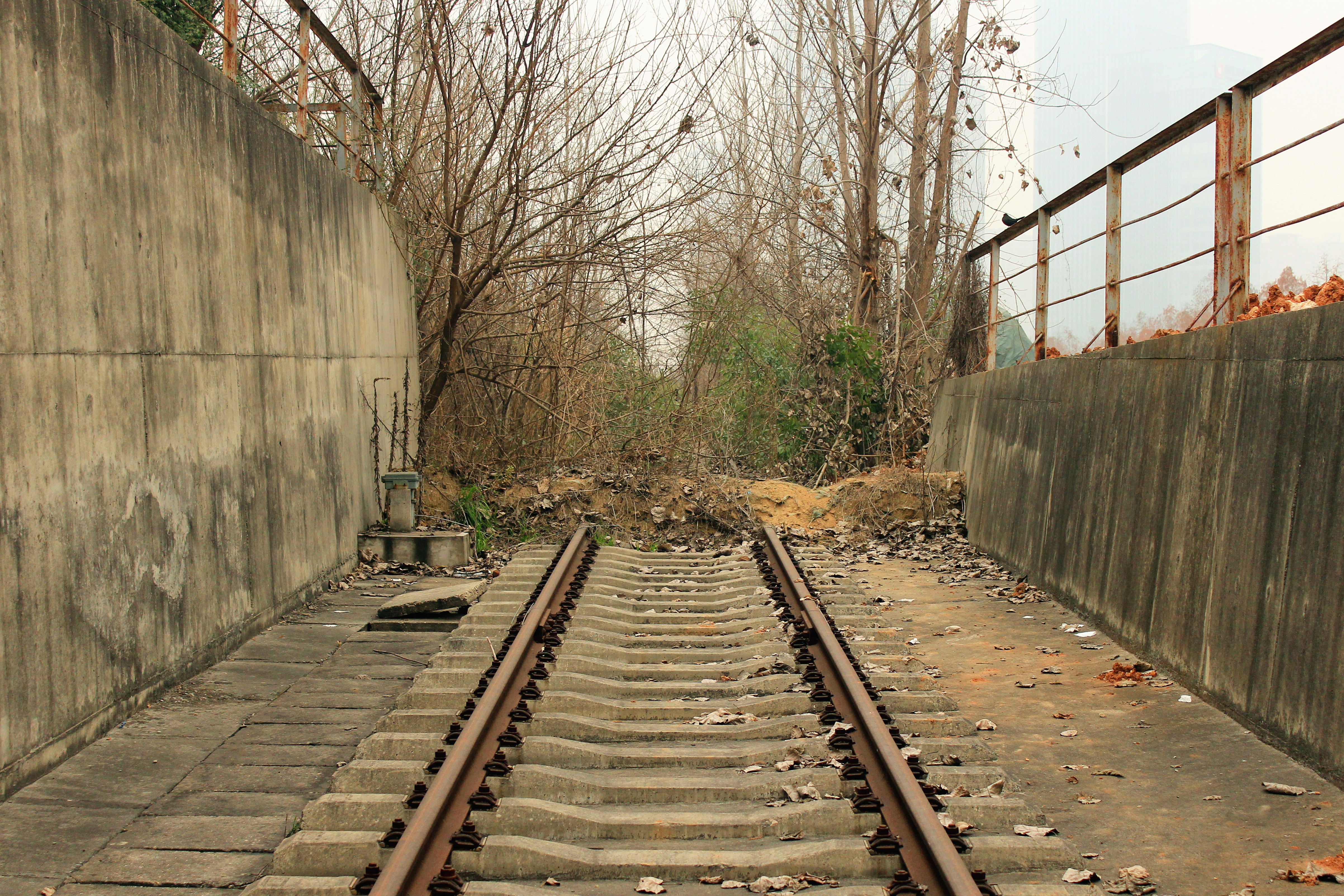 中文（中国大陆）: 武汉轨道交通2号线中山北路停车场与武九铁路北环线的联络线